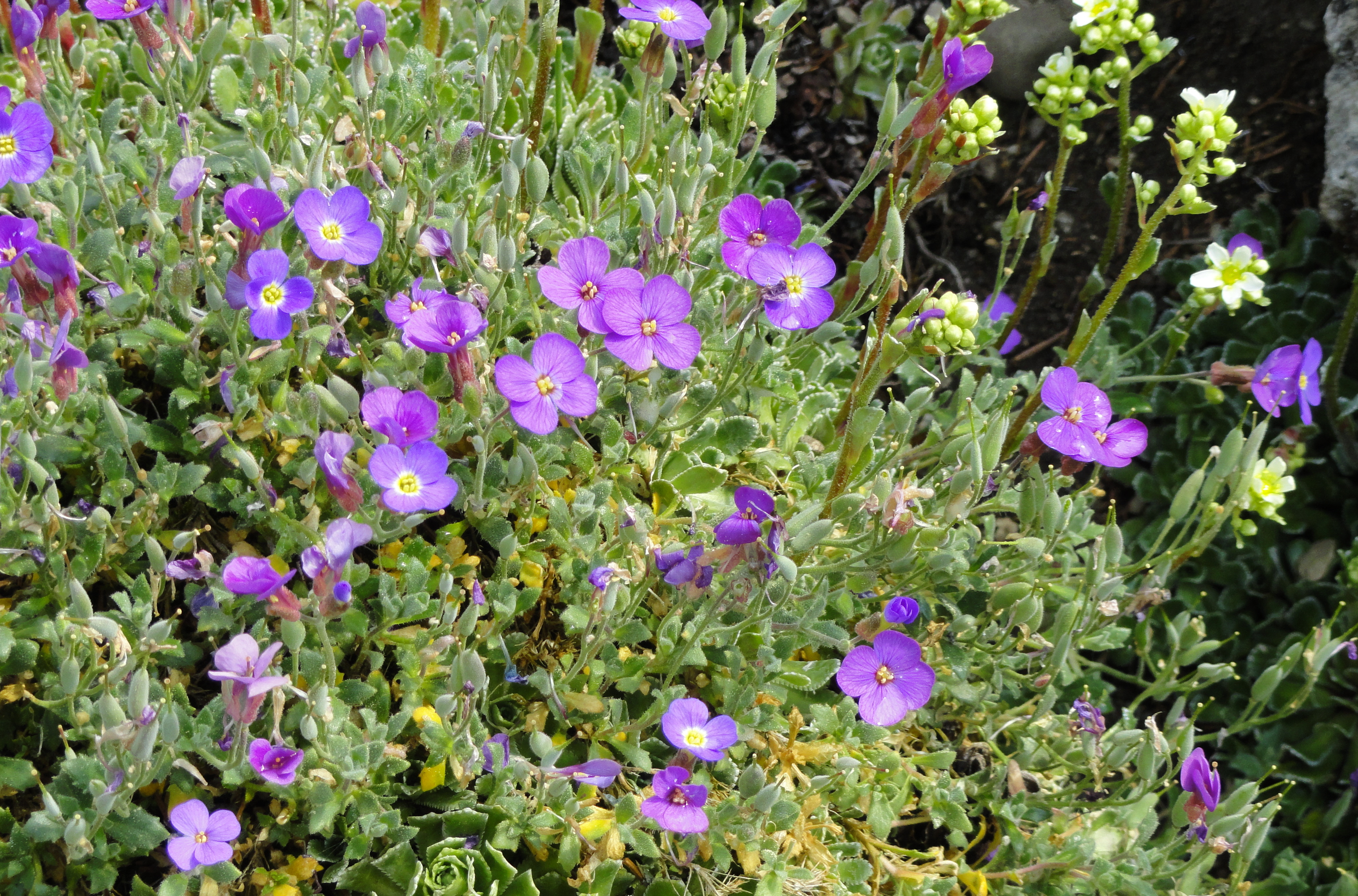 Aubrieta canescens specimen in the Botanischer Garten München-Nymphenburg, Munich, Germany.